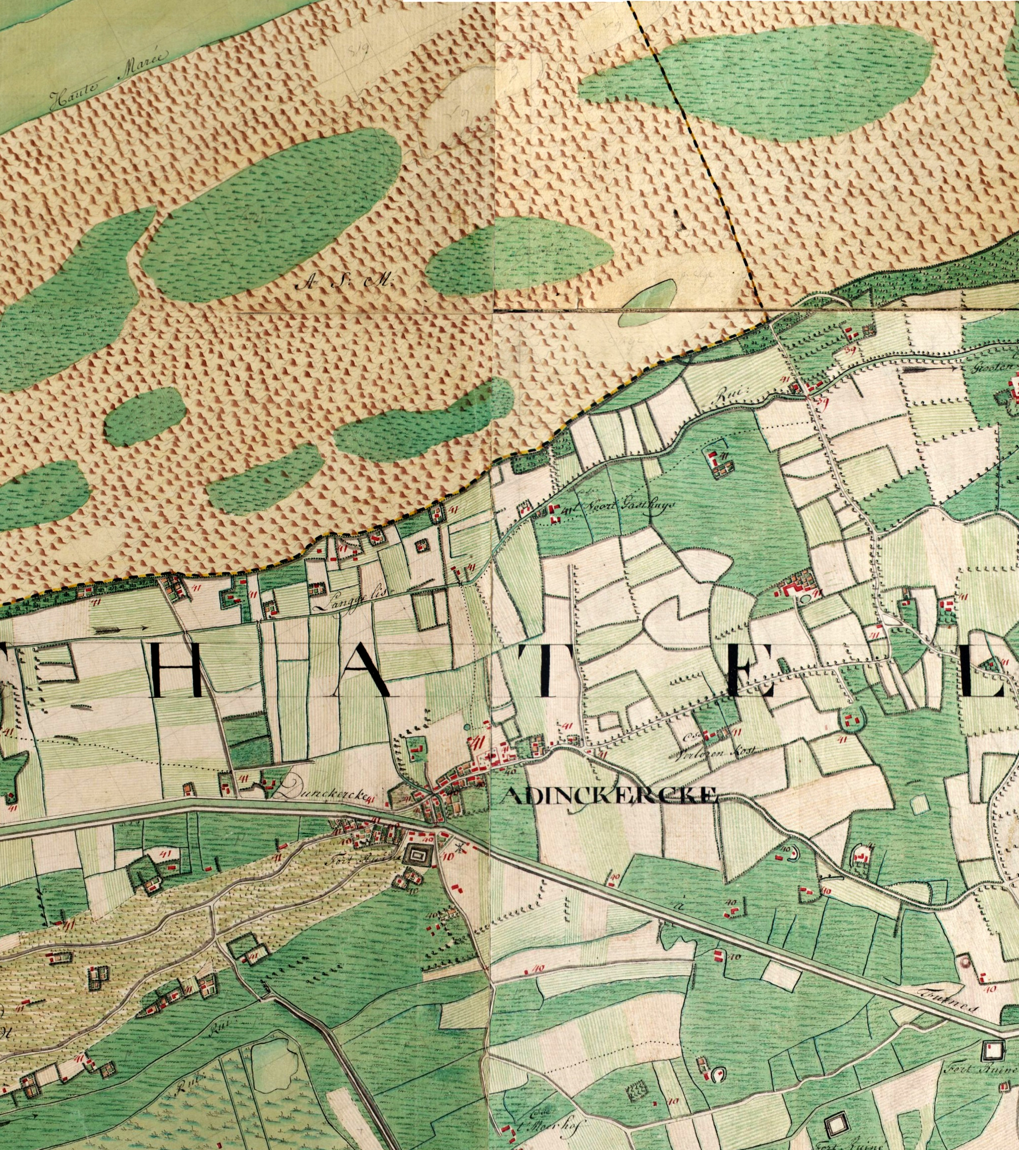 Carte de Ferraris centrée sur Adinkerke, dans la chatellenie de Furnes, avec la mer en haut à gauche.